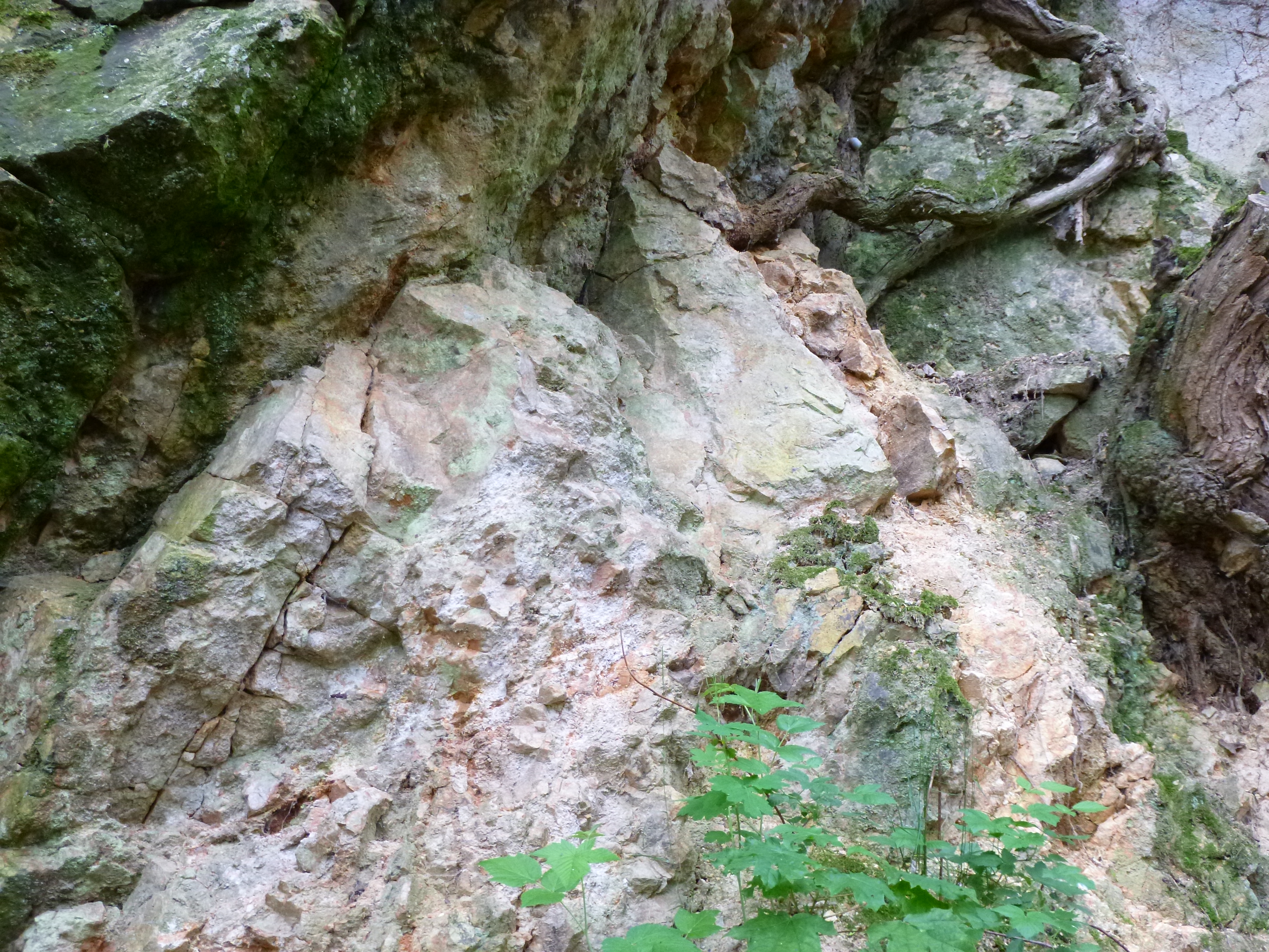 Der Quarzaufschluss am Schloss Steinach gehört zur Liste der Geotope im Landkreis Straubing-Bogen; Nr. 278A007.